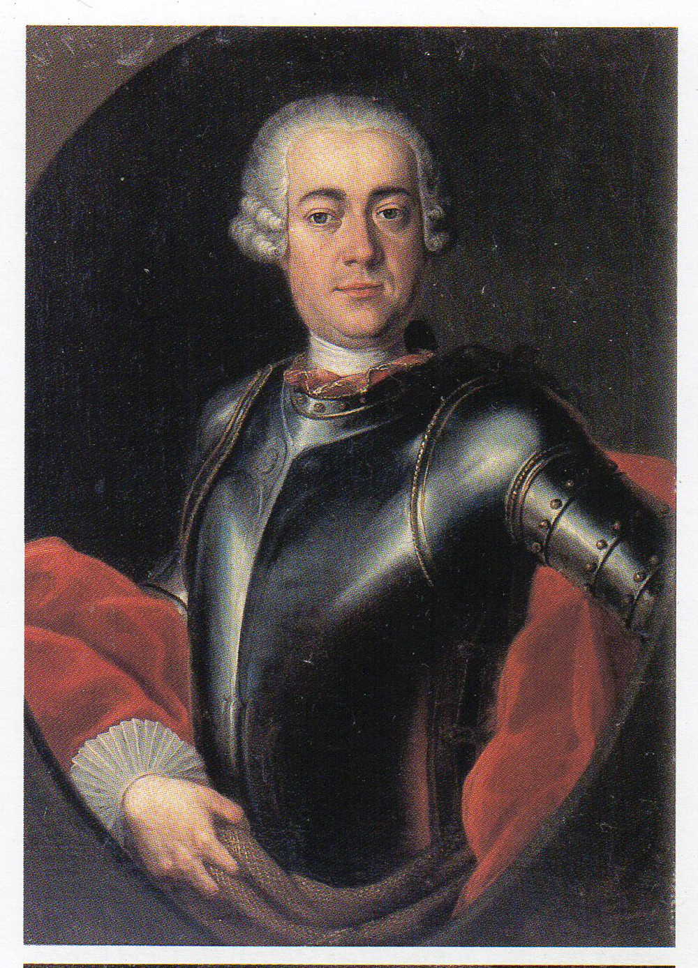 Ölgemälde des Franz Josef Graf Hendl-Goldrain